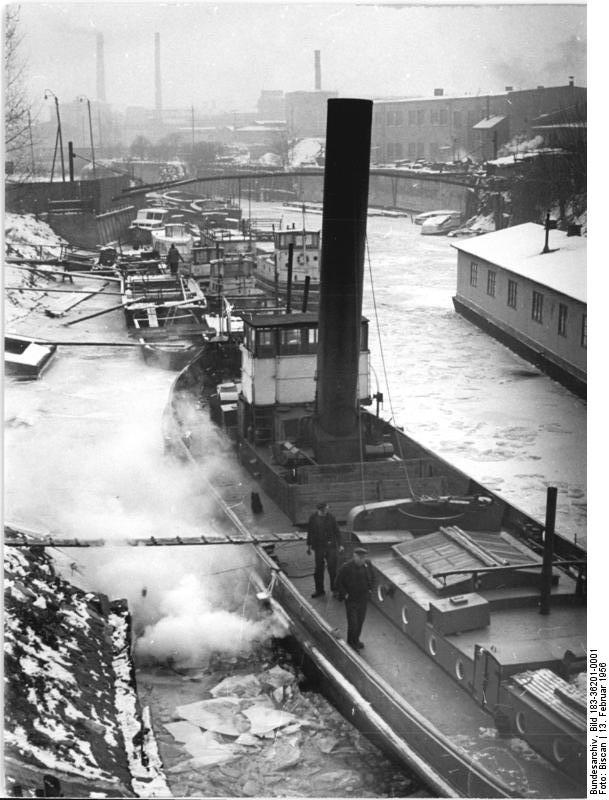 Zentralbild-Biscan Zi-Ho.13.2.1956 Starkes Treibeis auf der Elbe Der Kälteeinbruch hat die Schiffahrt auf der Elbe lahmgelegt. Starkes Treibeis zwang die Schiffe, die schützenden Häfen aufzusuchen. Bei Anhalten der Kälte ist damit zu rechnen, dass die Eismassen zum Stillstand kommen und die Elbe zufriert. UBz, Blick in den Hafen von Magdeburg-Buckau, wo zahlreiche Schiffe Unterschlupf gefunden haben.